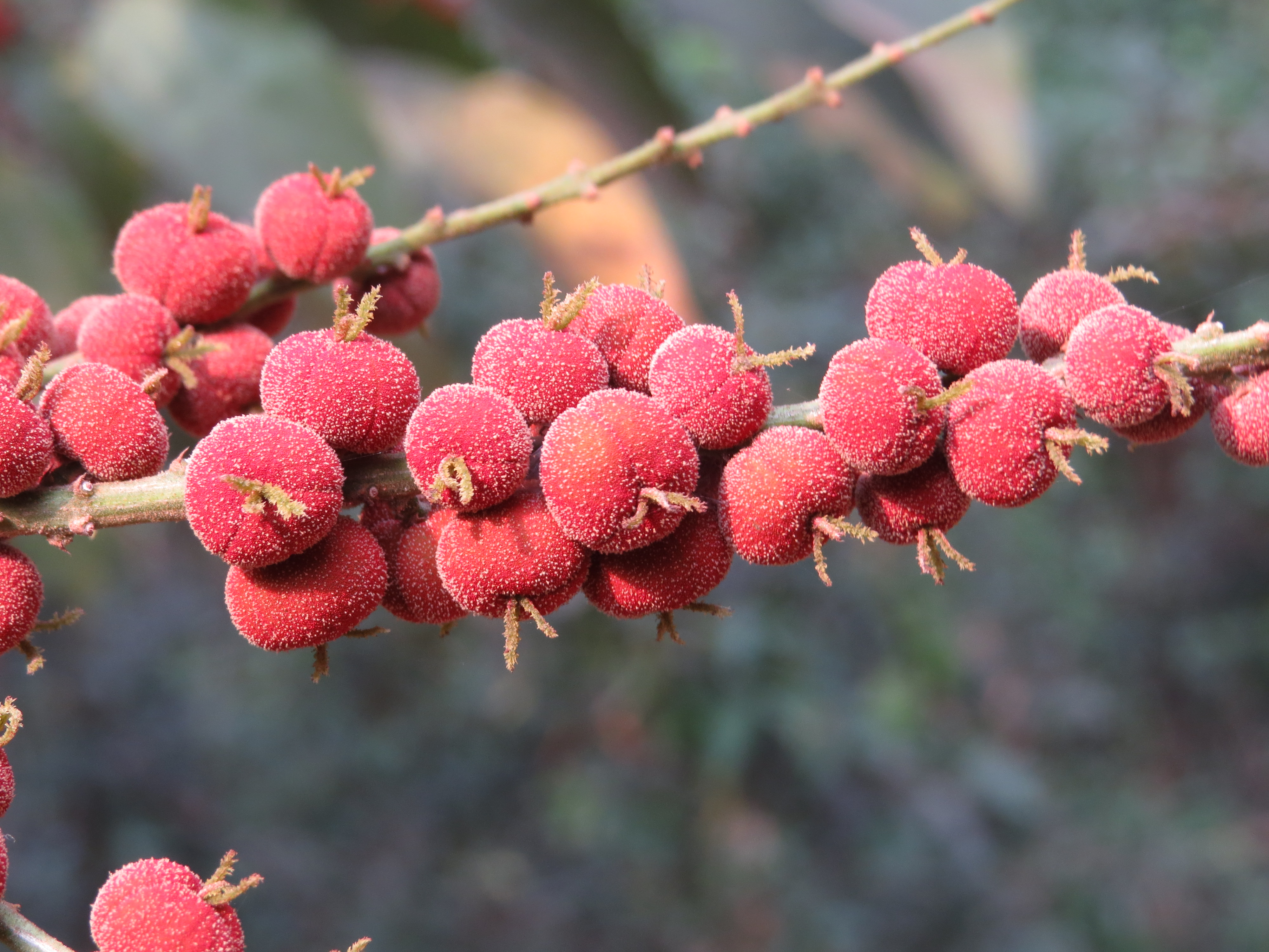 Photos from Peravoor